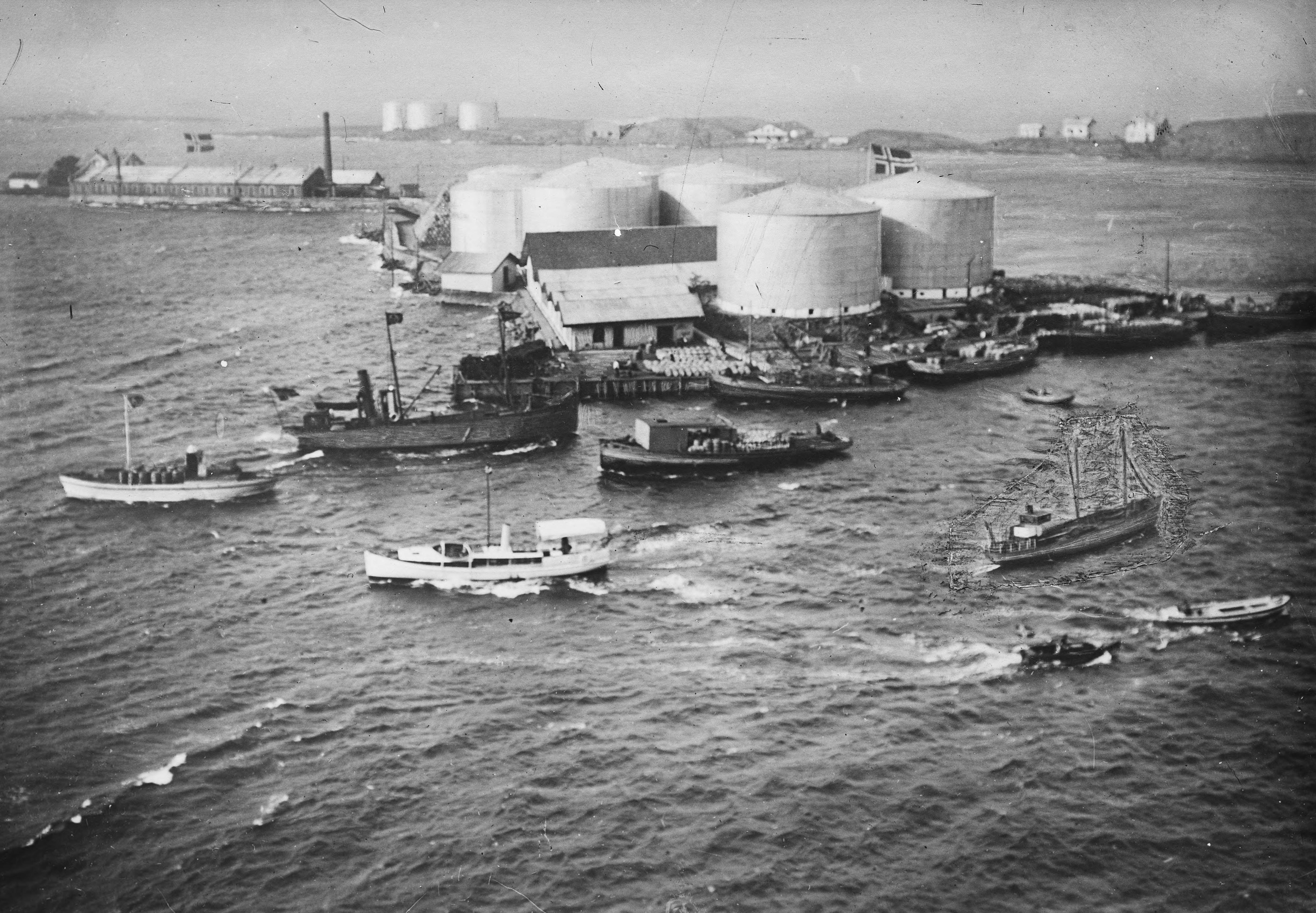 Bildet er hentet fra Nasjonalbibliotekets bildesamling. Anmerkninger til bildet var: Påskrift eske: Østlandske 1917 Oslo, Oslo